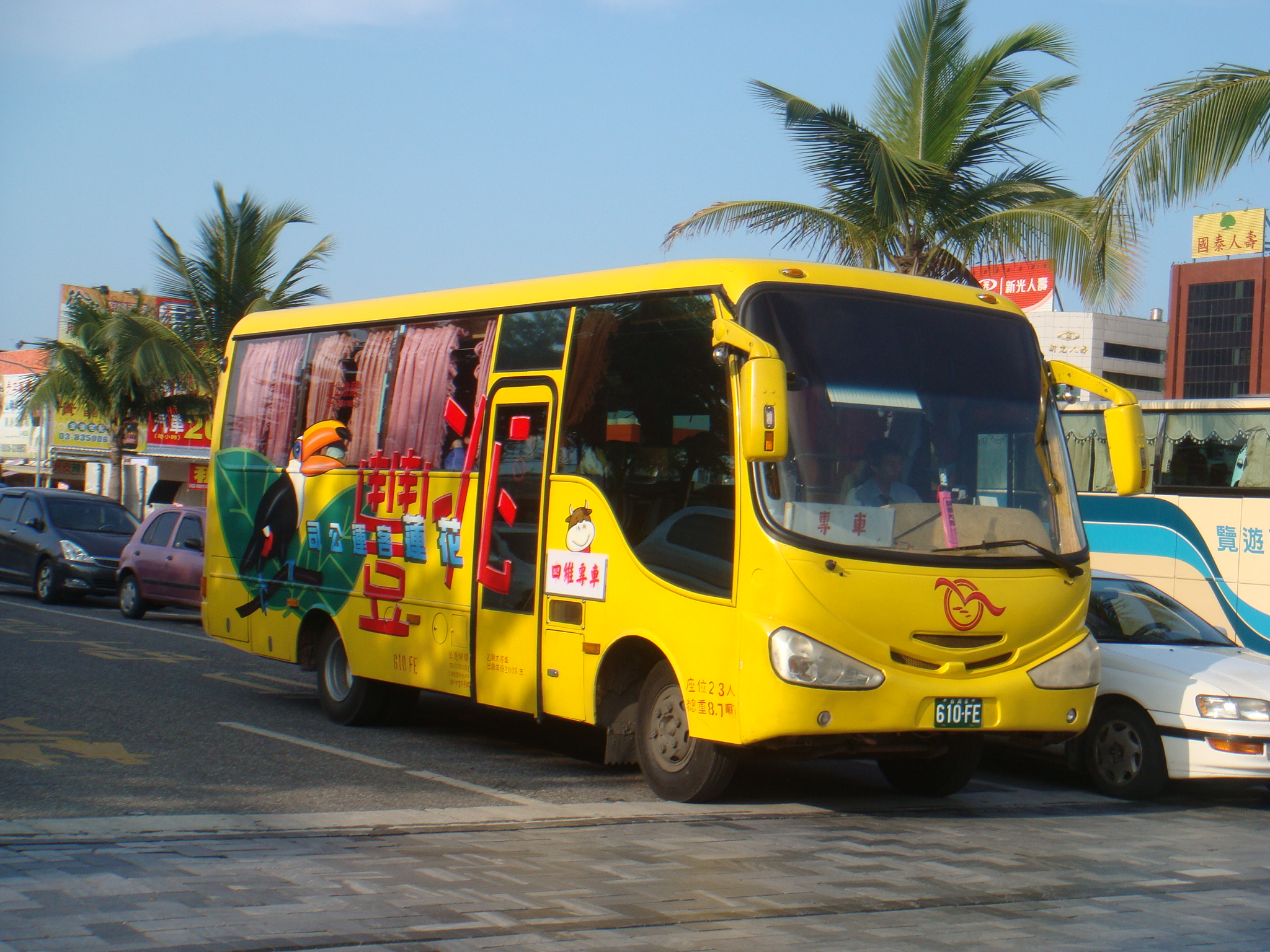 花蓮客運610-FE 四維高中專車(610-FE現已換牌到901-FW)